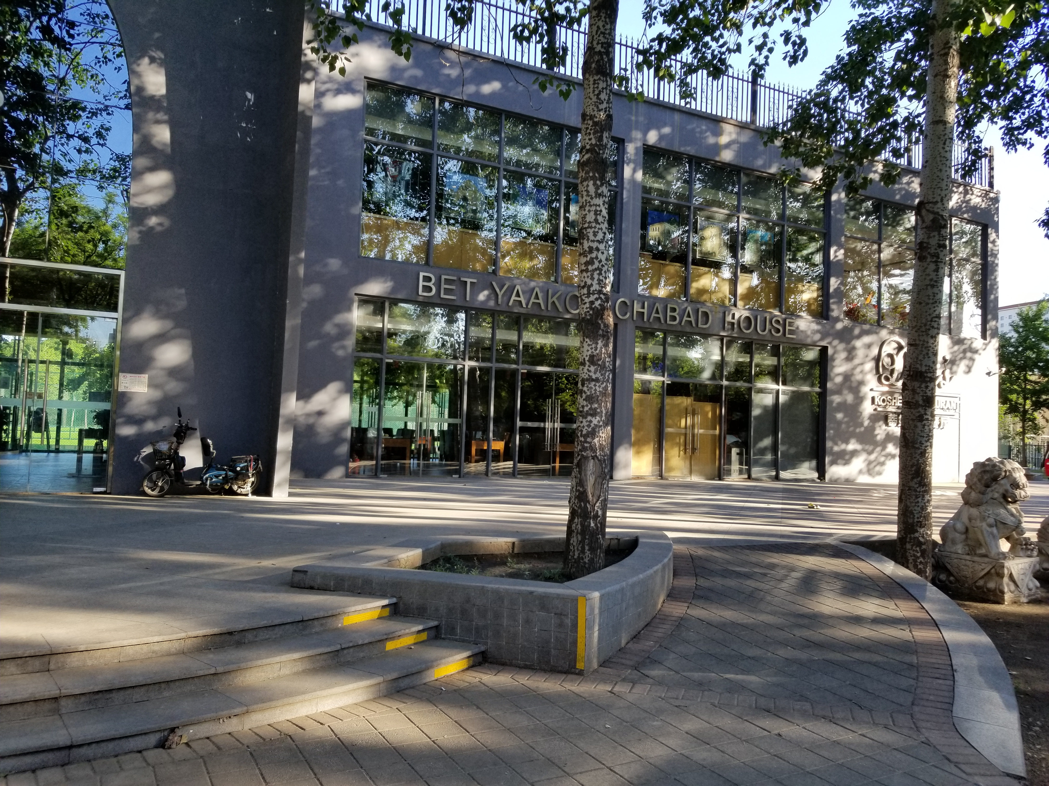 בית חב"ד בביג'ינג